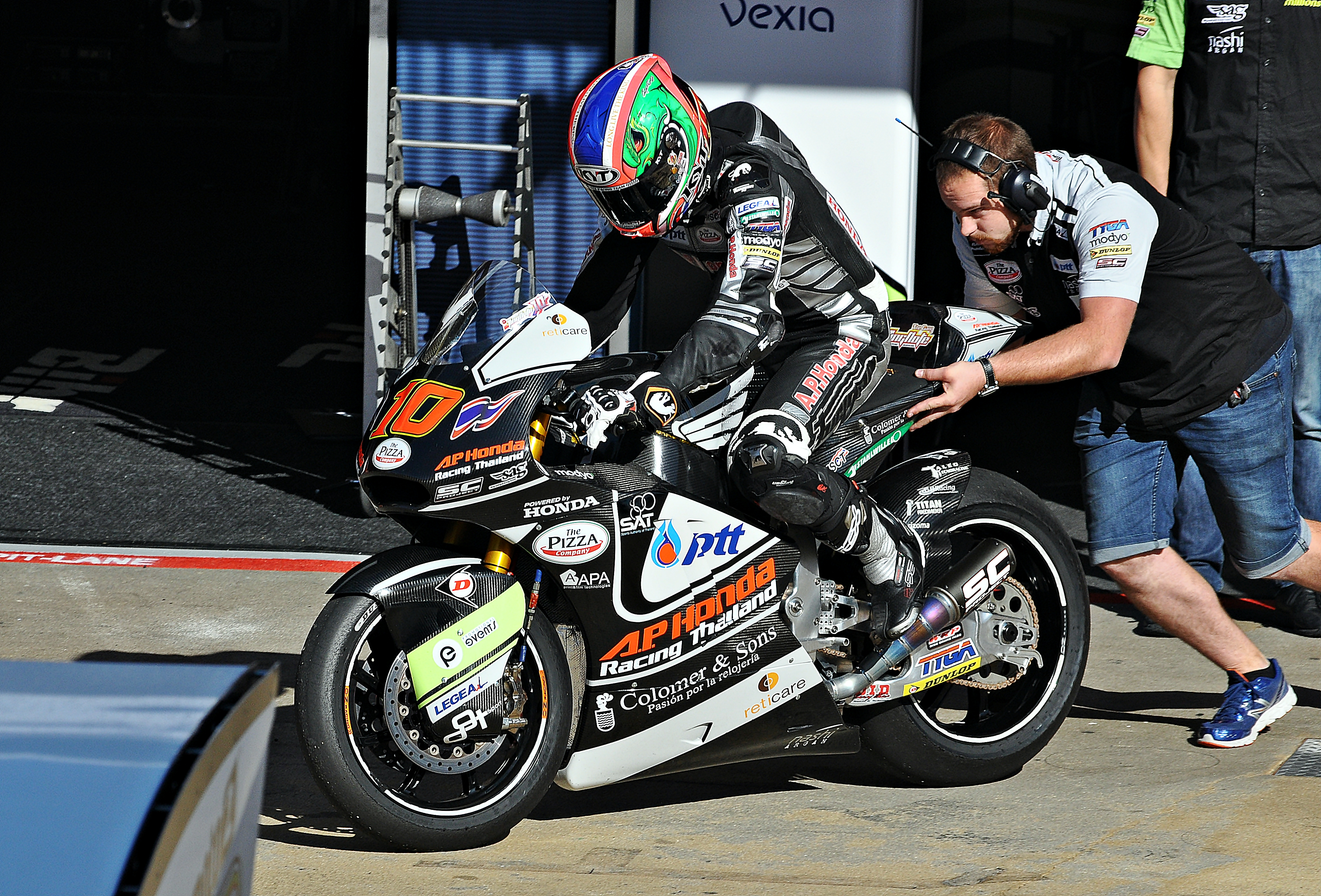 gran premio de cataluña